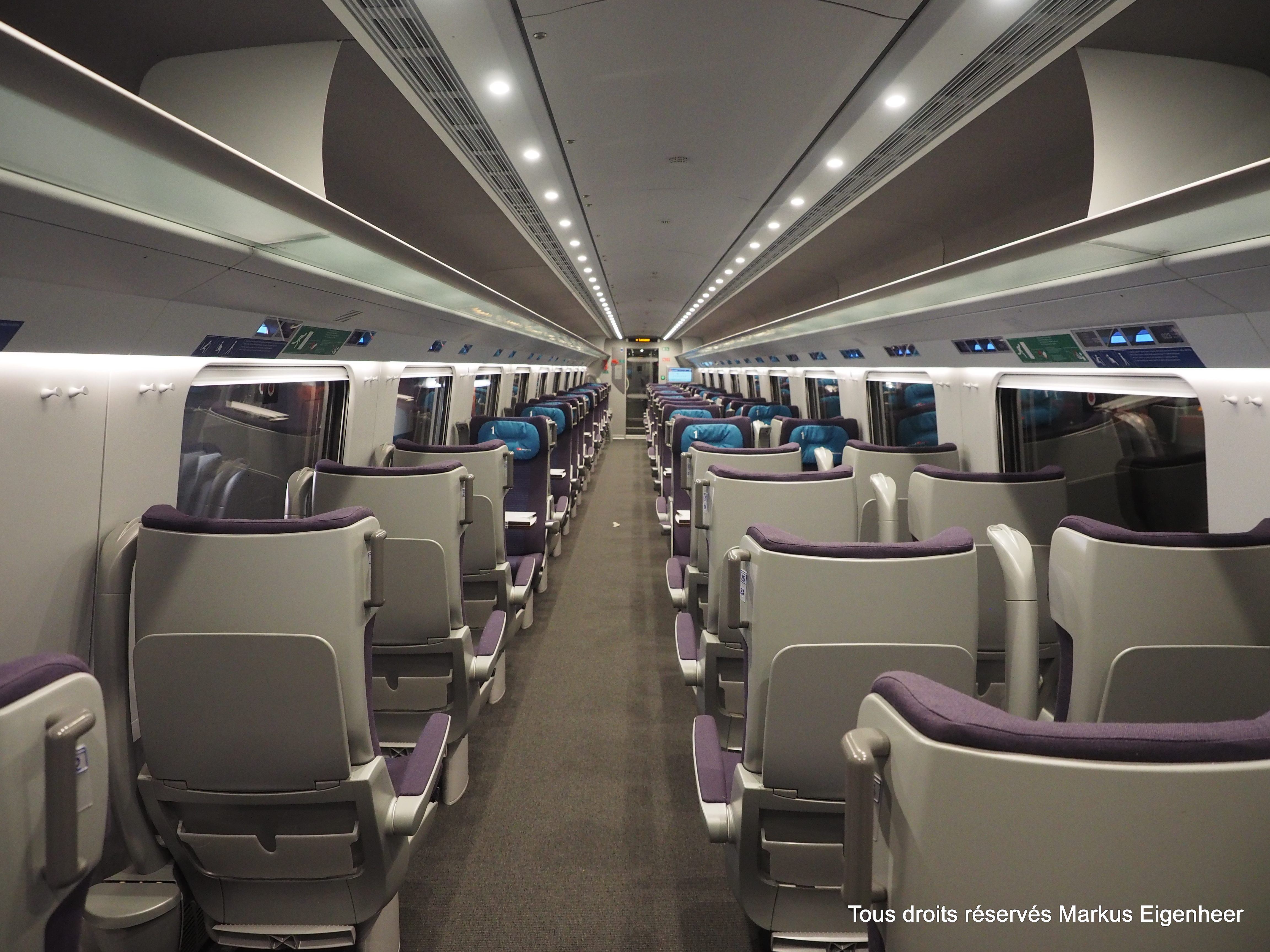 Genève 29.11.2014